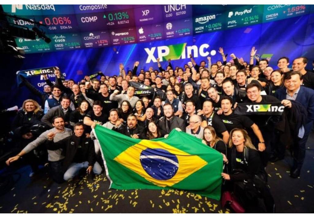 Executivos XP e Agentes Autônomos reunidos na Nasdaq